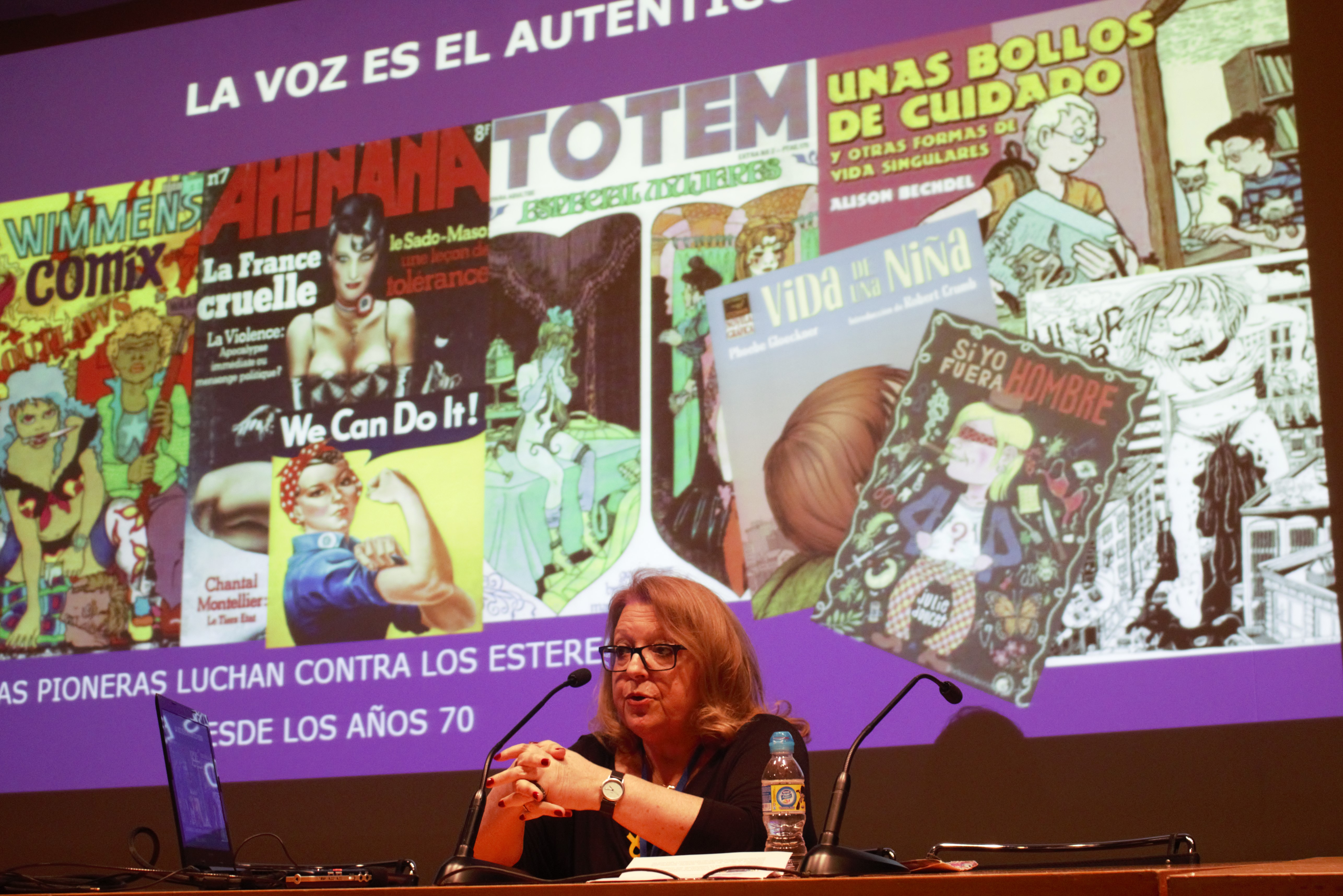 La il·lustradora de còmic catalana María del Carmen Vila Migueloa, més coneguda com a Marika a la conferència "El cuerpo ocupado: la voz de las mujeres en el cómic español". Saló Internacional del Còmic de Barcelona de 2018.